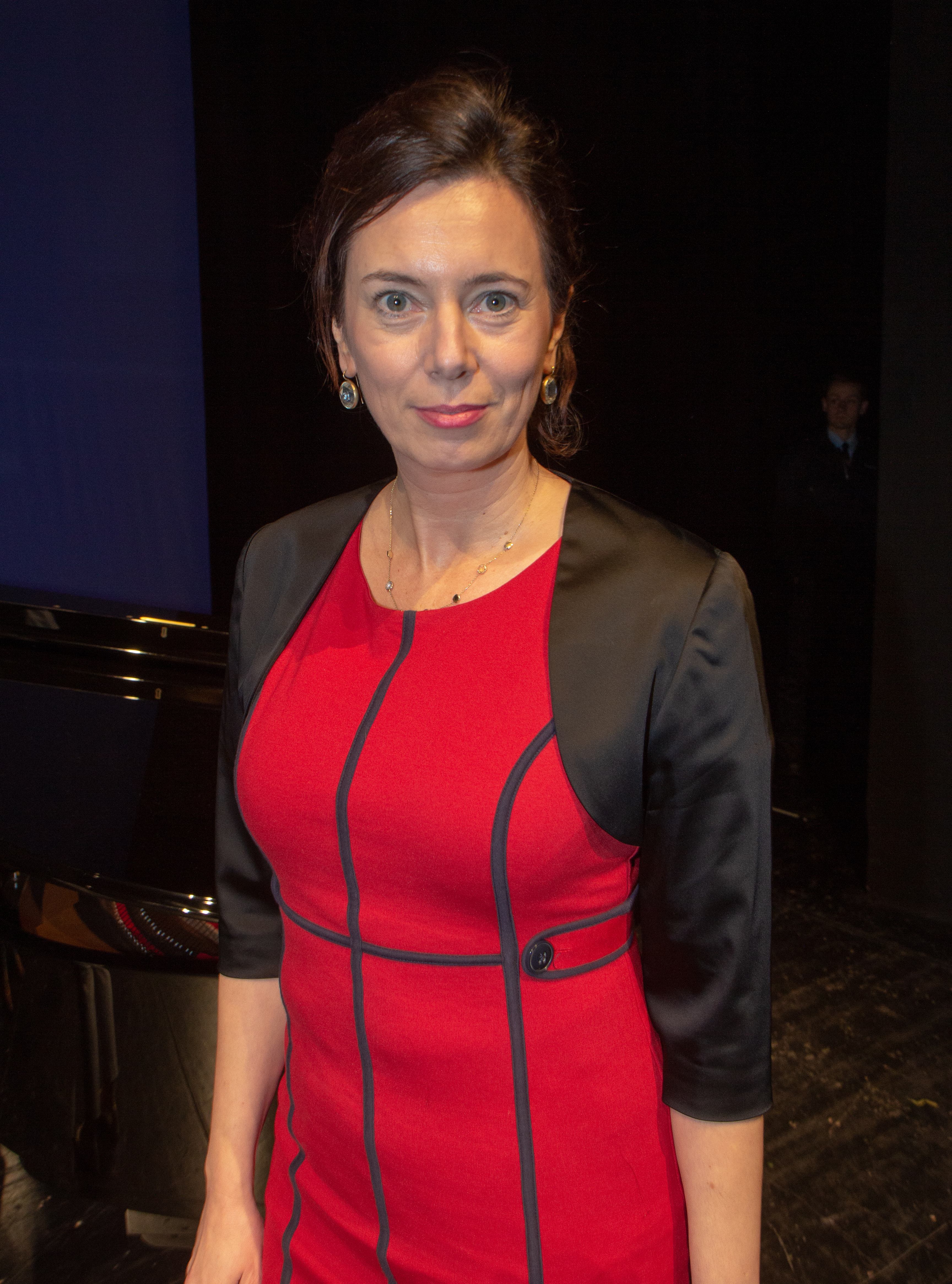 Eva Menasse bei der Verleihung der Carl-Zuckmayer-Medaille an Robert Menasse im Staatstheater Mainz am 18. Januar 2019.